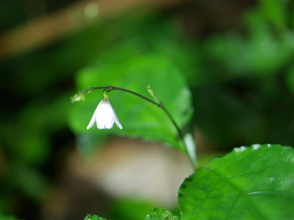 2018/12/30 沖縄本島：Okinawa Island, Japan